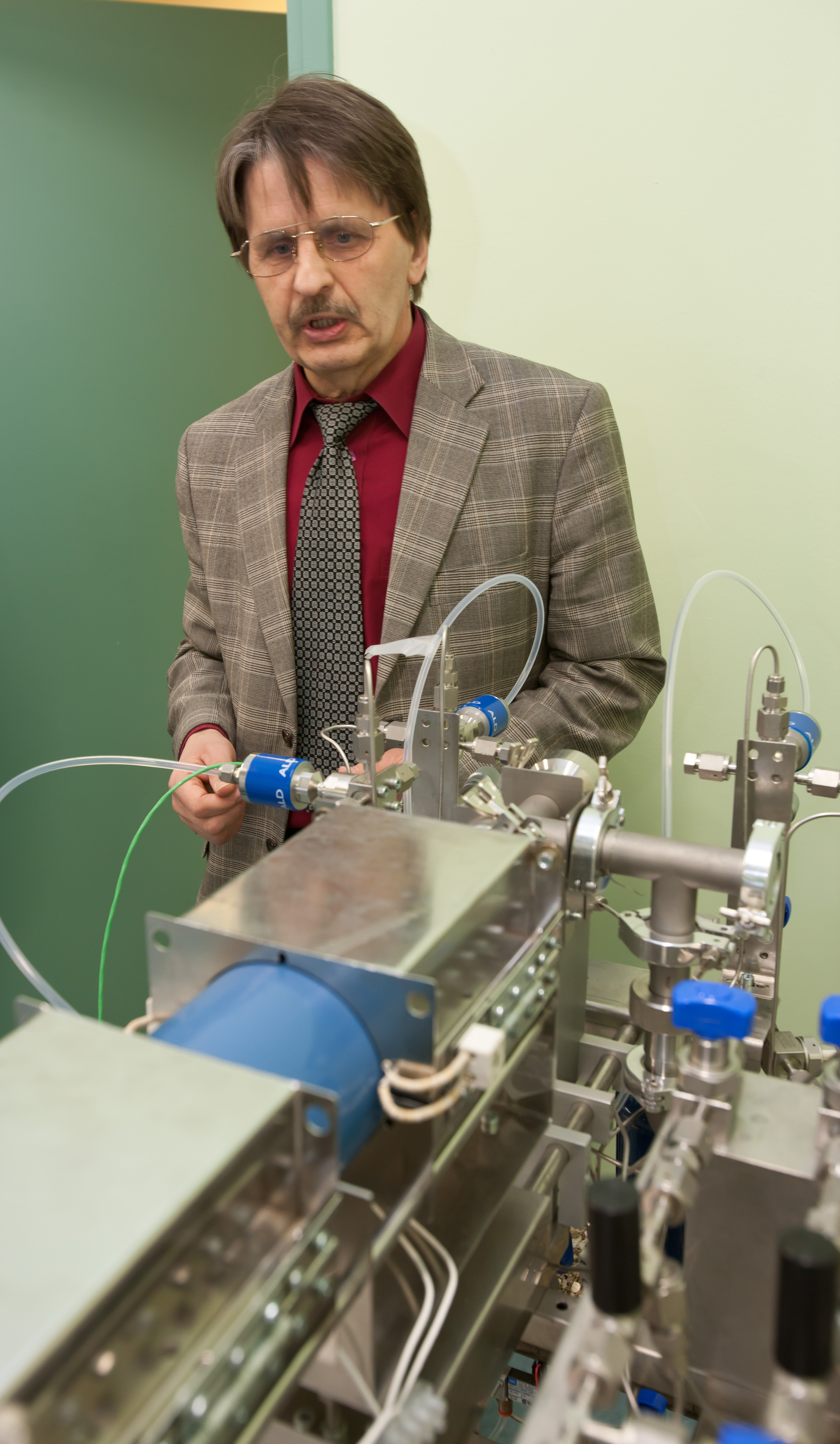 Väino Sammelselg tutvustamas Tartus valmistatud aatomkihtsadestuse reaktorit.